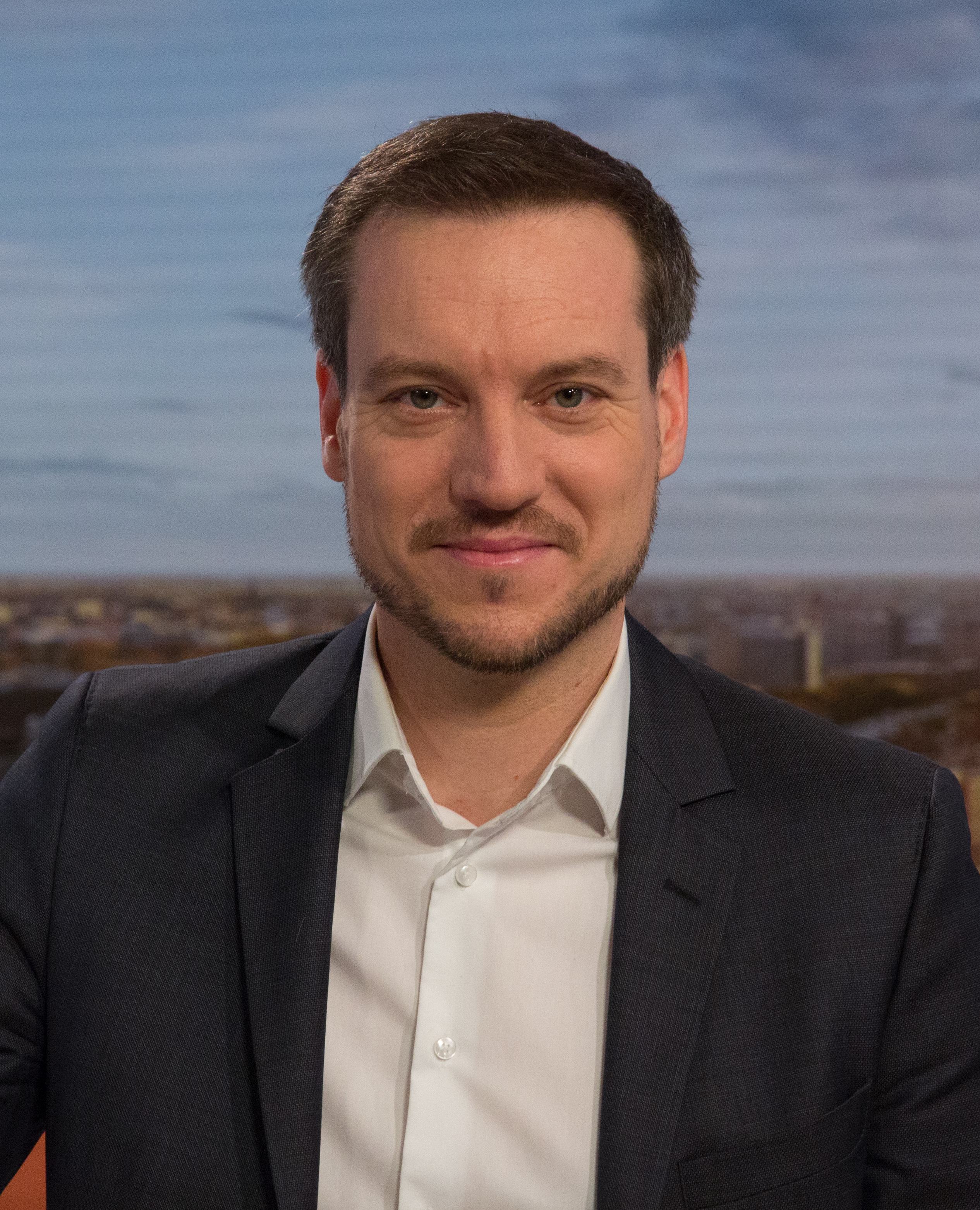 Pressetermin des ZDF zum ZDF-Mittagsmagazin in der neuen Studiokulisse mit ZDF-Chefredakteur Peter Frey, Andreas Wunn, Leiter der neuen ZDF-Redaktion Tagesmagazine Berlin sowie der neuen "ZDF-Mittagsmagazin"-Moderatorin Jana Pareigis.